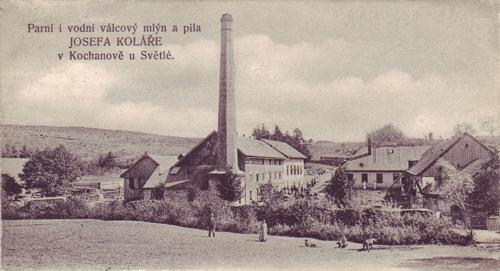 celkový pohled na Malý Mlýnek z roku 1908